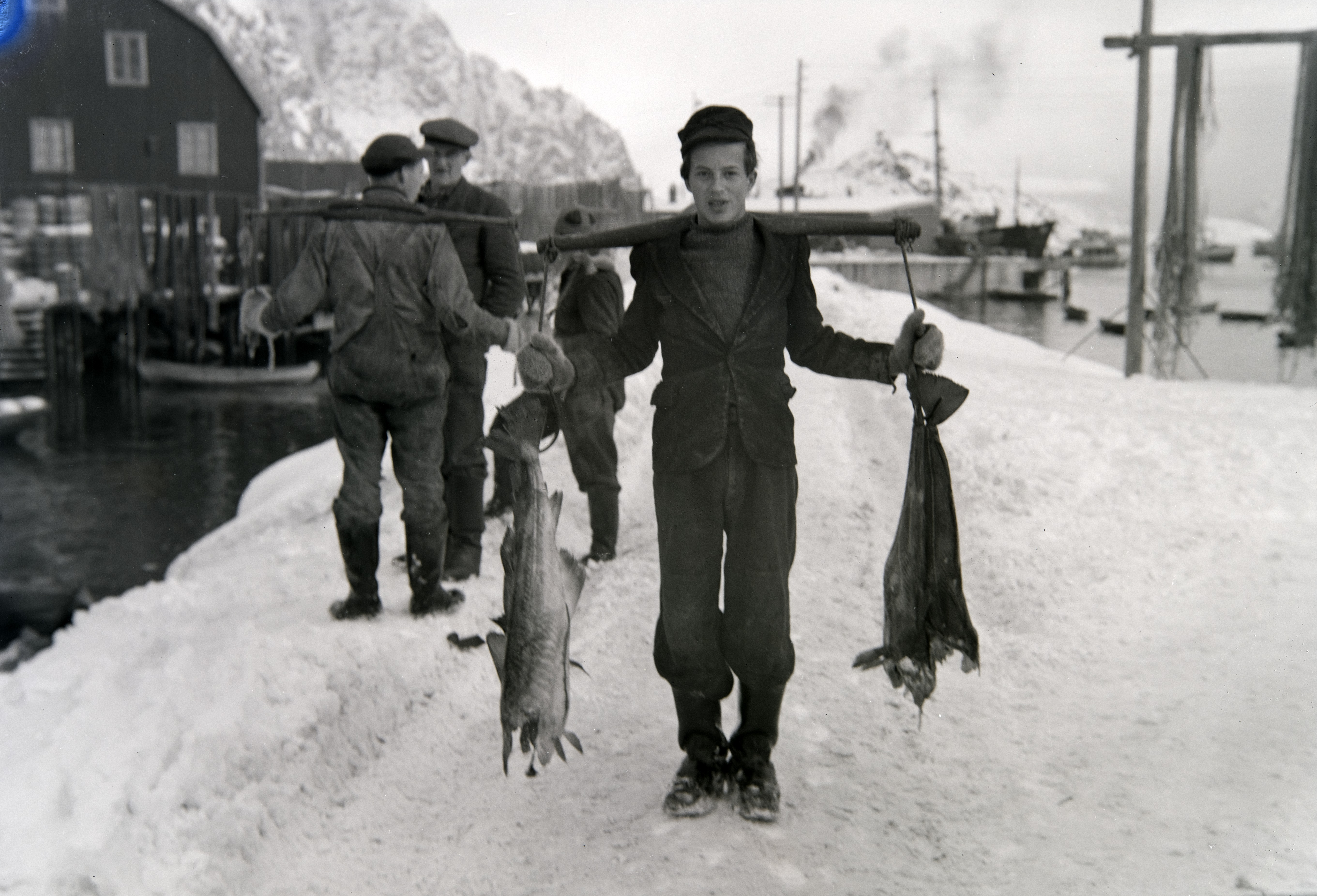 Bildet er hentet fra Nordlandsmuseet bildesamling etter Kanstad. Motivbeskrivelse: Mann bærer fisk; børtre Nøkkelord: Levnetsbeskrivelser Marine industrier Bære og pakkeredskaper, tilbehør